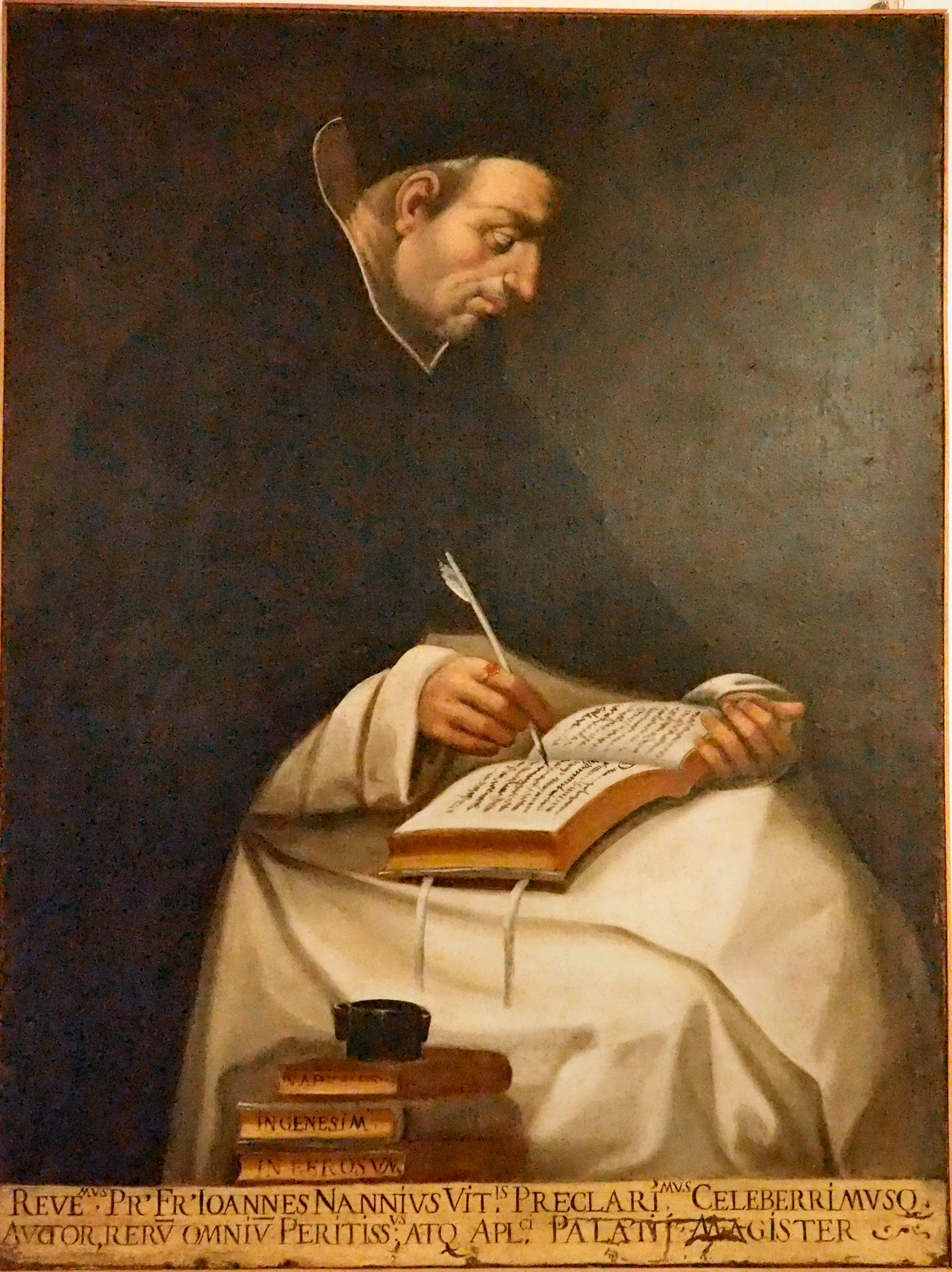 Museo Civico Viterbo - di anonimo sec. XVIII